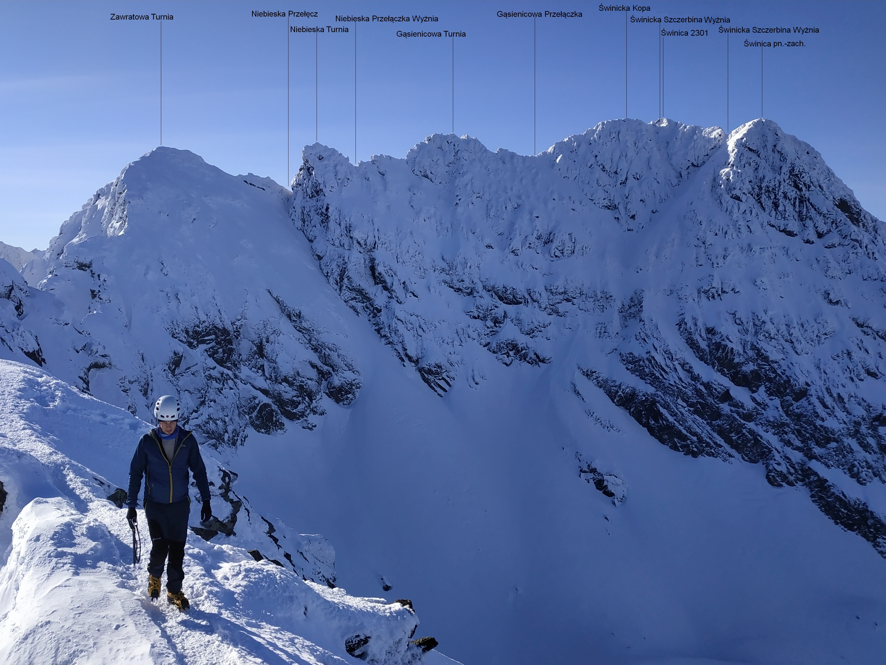 Wschodnia grań Świnicy. Widok z Kościelca